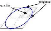 Tracé d'une ellipse à main nue à l'aide d'un parallélogramme exinscrit. Cette méthode utilise le fait qu'une ellipse est un cercle vu en perspective, et qu'un cercle est inscrit dans un carré (le carré est alors vu comme un parallélogramme en perspective). Auteur : Christophe Dang Ngoc Chan, réalisé avec un programme de dessin vectoriel Licence GFDL Christophe Dang Ngoc Chan